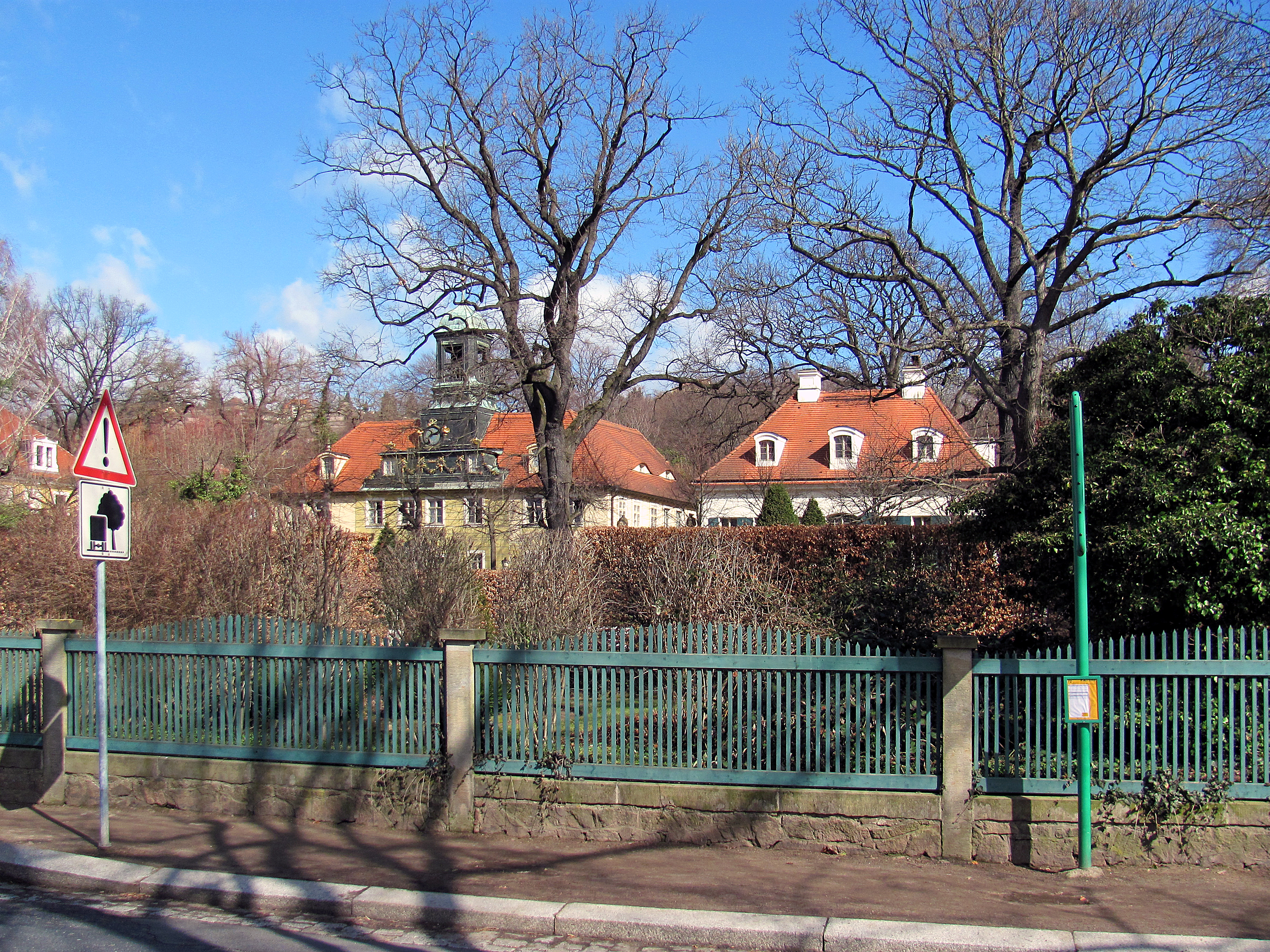 Radebeul-Oberlößnitz, Haus Sorgenfrei mit Turmaufbau, rechts der Gartensaal